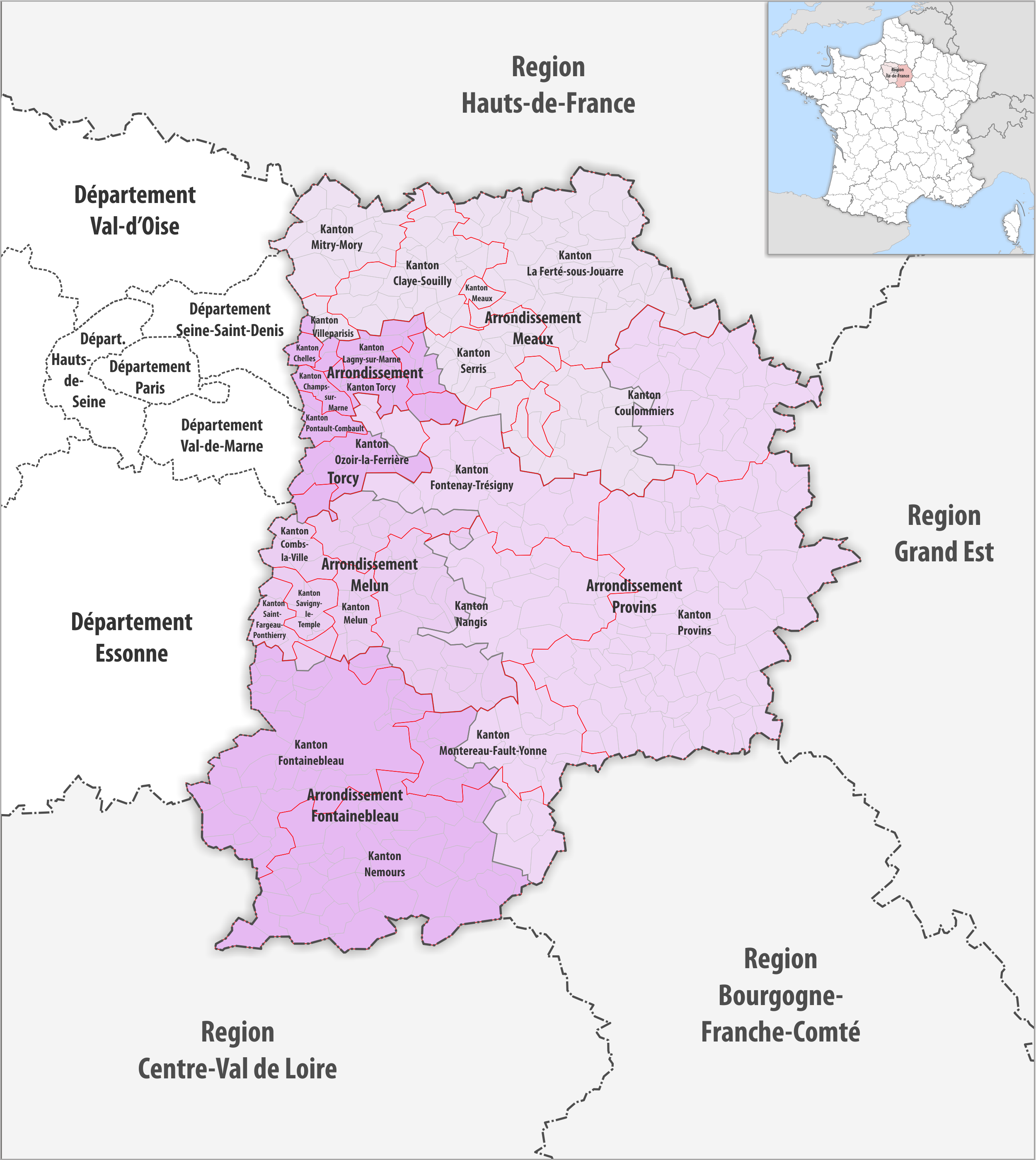 Gemeinden, Kantone und Arrondissemente im Departement Seine-et-Marne